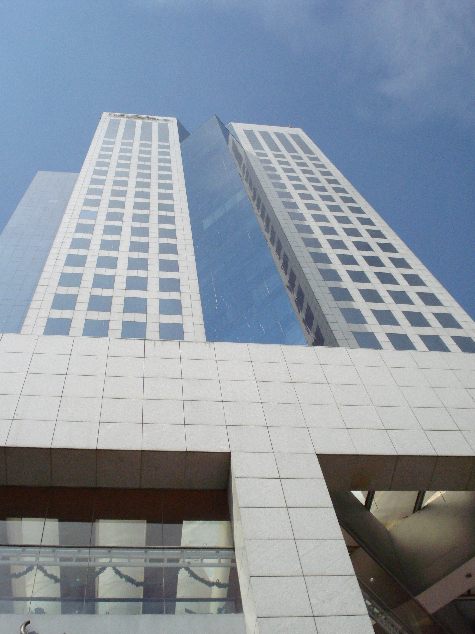 Torre Mural en la Avenida de los Insurgentes Sur, en la Ciudad de México.